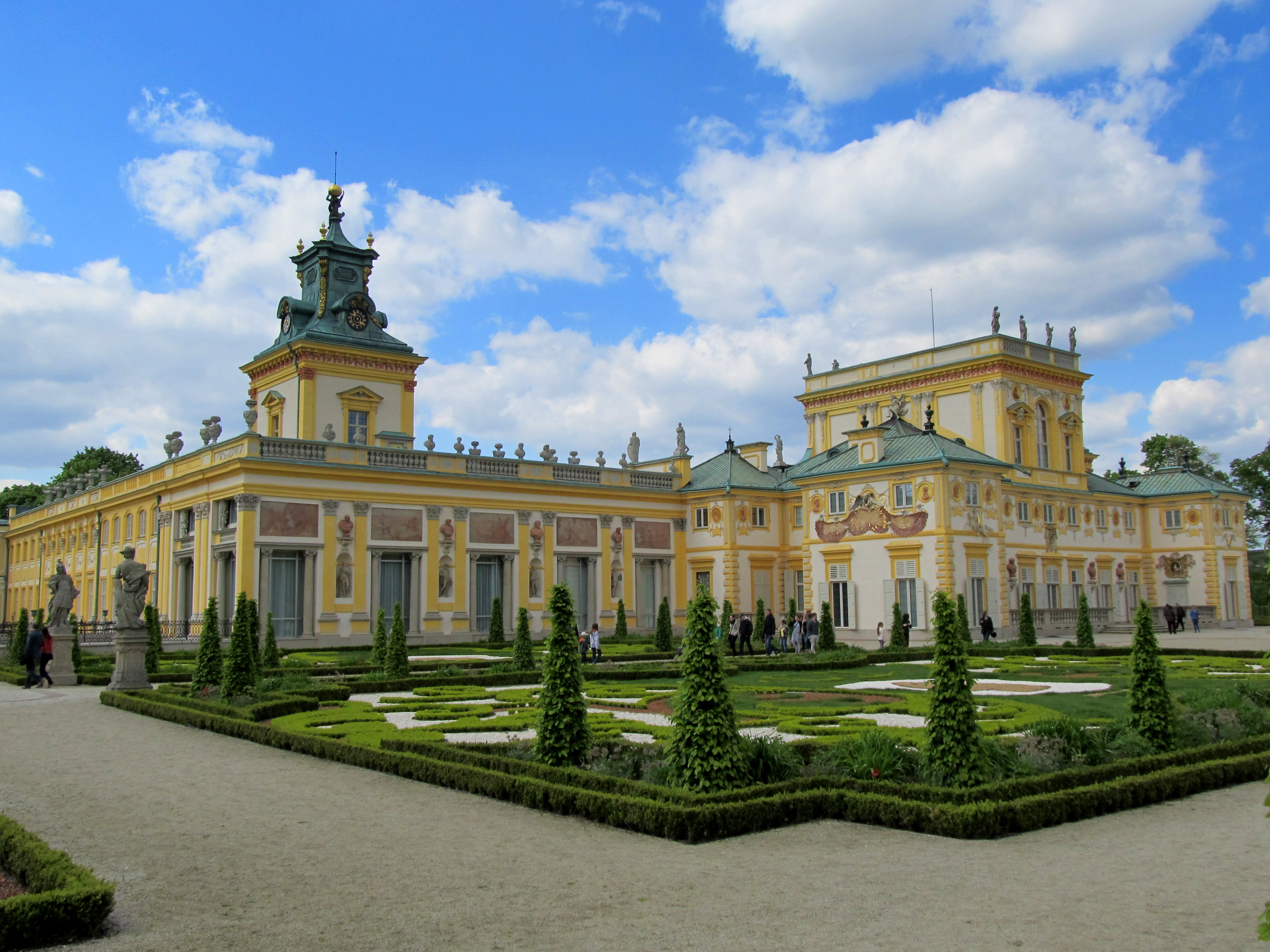 Warszawa, pałac Królewski z Łazienką Lubomirskiej (Marconiówka)